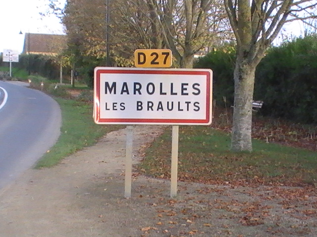 panneau de l'entrée de la ville route de Dangeul